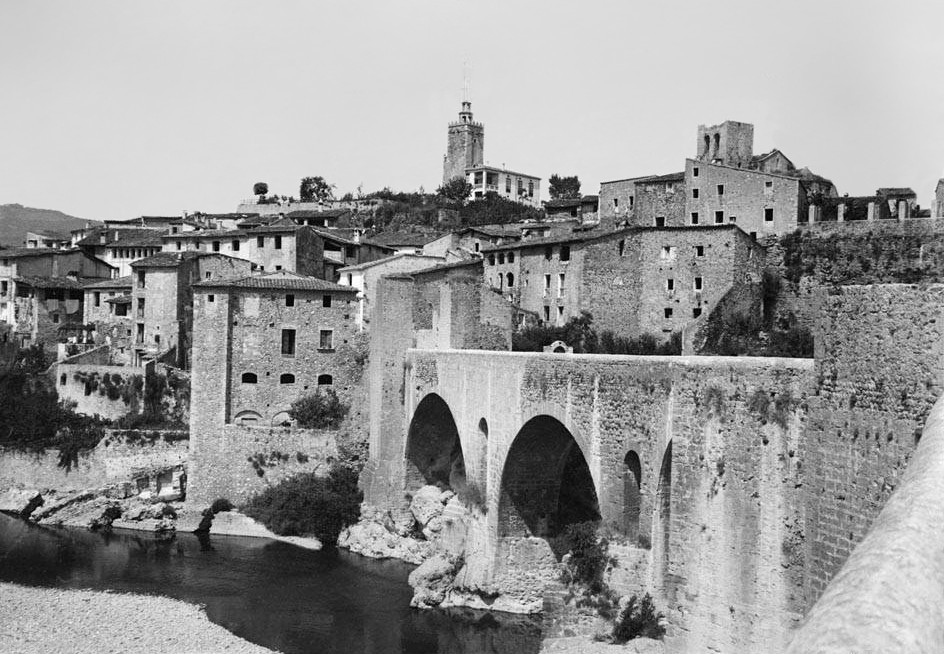 Imatge